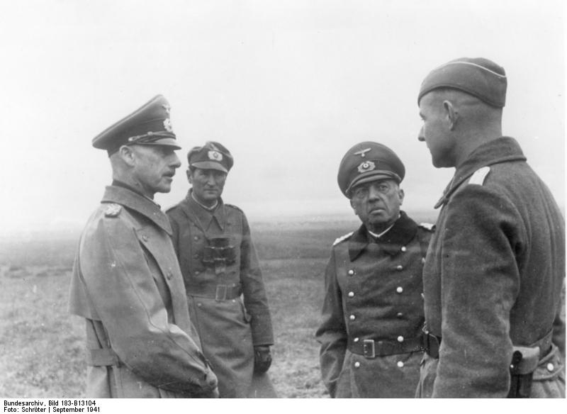 An der Sowjetfront. Der Oberbefehlshaber der Heeresgruppe Nord, Generalfeldmarschall Ritter von Leeb und der Oberbefehlshaber der 18. Armee, Generaloberst von Küchler im Gespräch mit einem Offizier an der Front. (bei Krasnoje Selo) PK-Aufnahme: Kriegsberichter: Schröter 9219-41 "Fr." "Fr.OKW" Sept.41